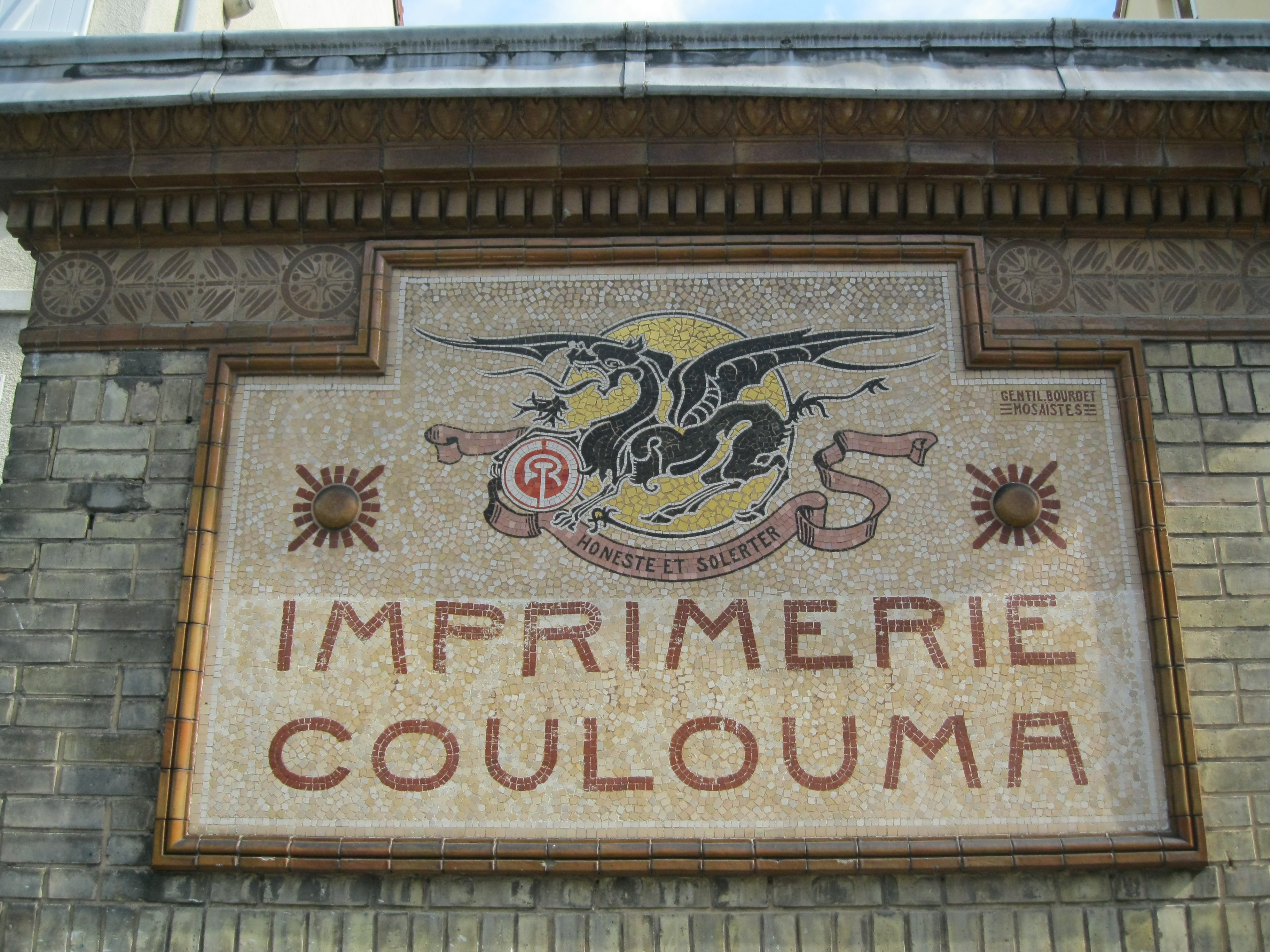 A l'adresse de l'imprimerie, 18 rue de Diane à Argenteuil, l'on peut voir cette enseigne au griffon qui est la marque du Maître-Imprimeur Robert Coulouma.